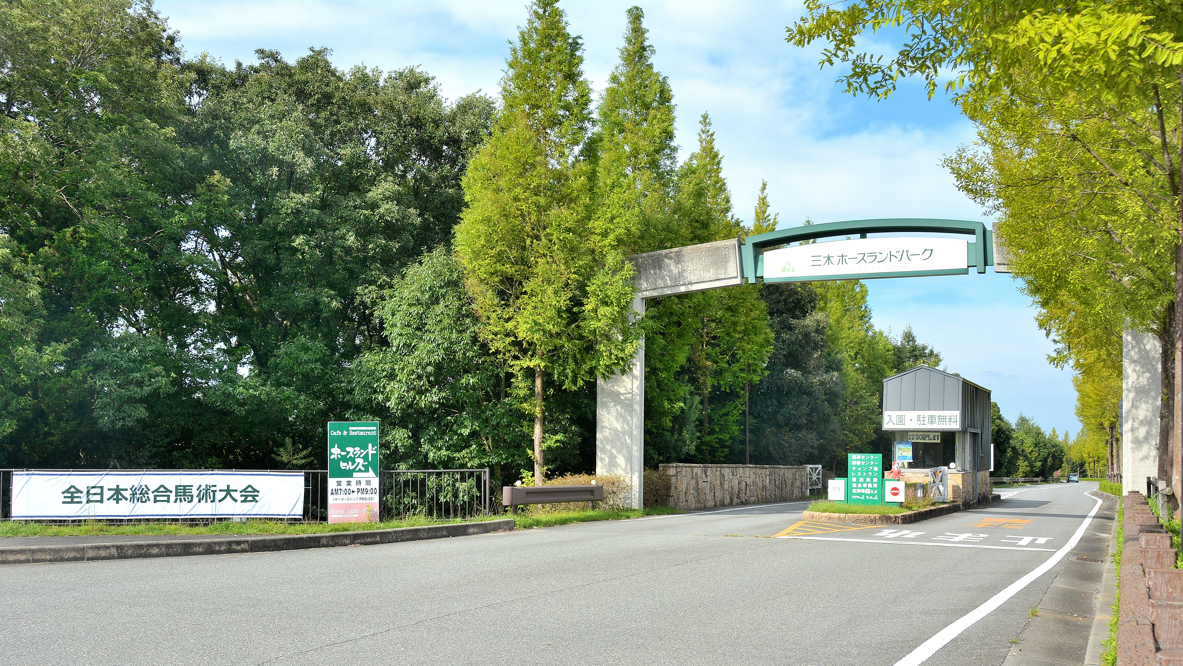 2015年9月5日に「第45回全日本総合馬術大会2015」が開催された際に、「三木ホースランドパーク」の入口を撮影したもの。